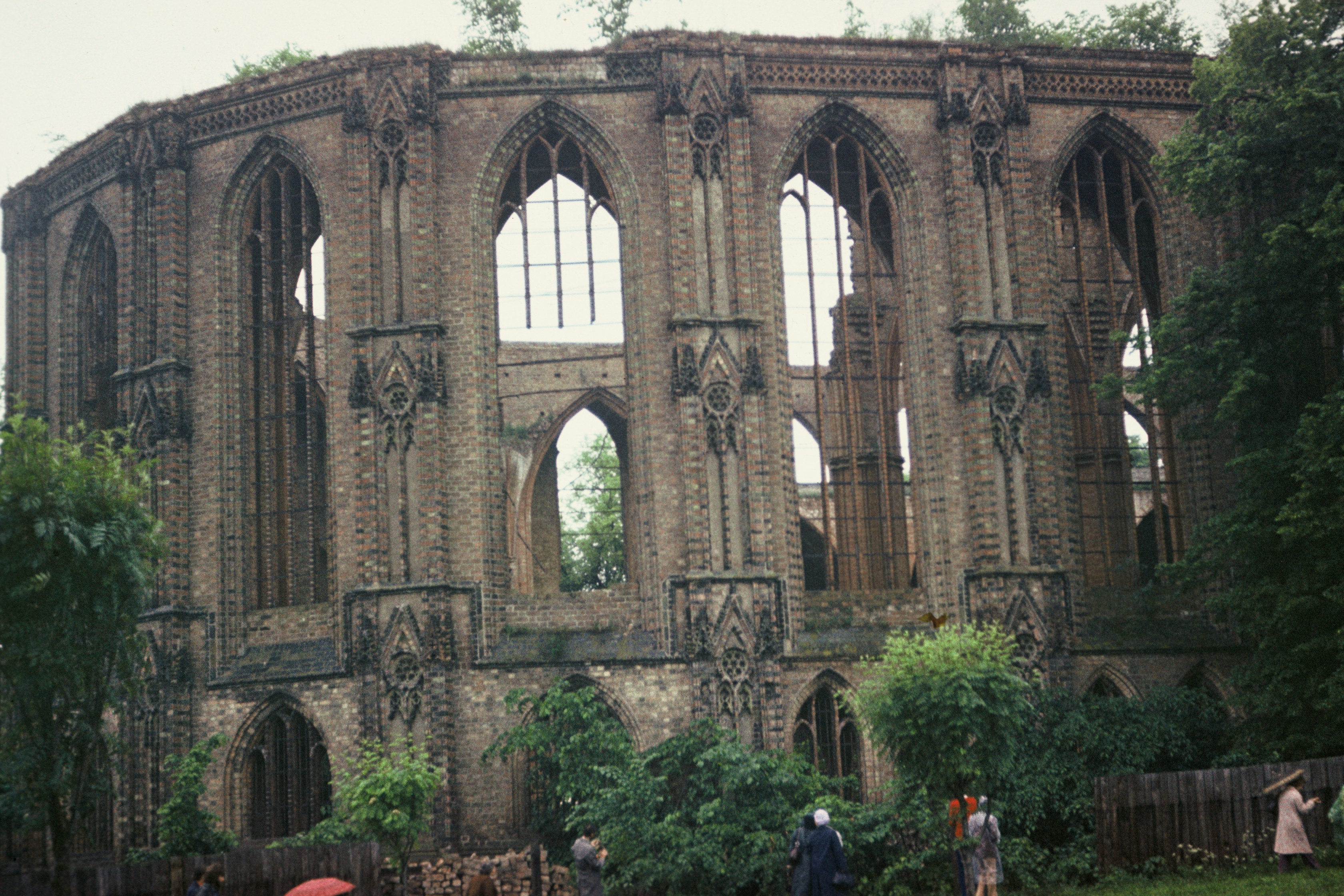 Ruina kościoła Mariackiego w Chojnie